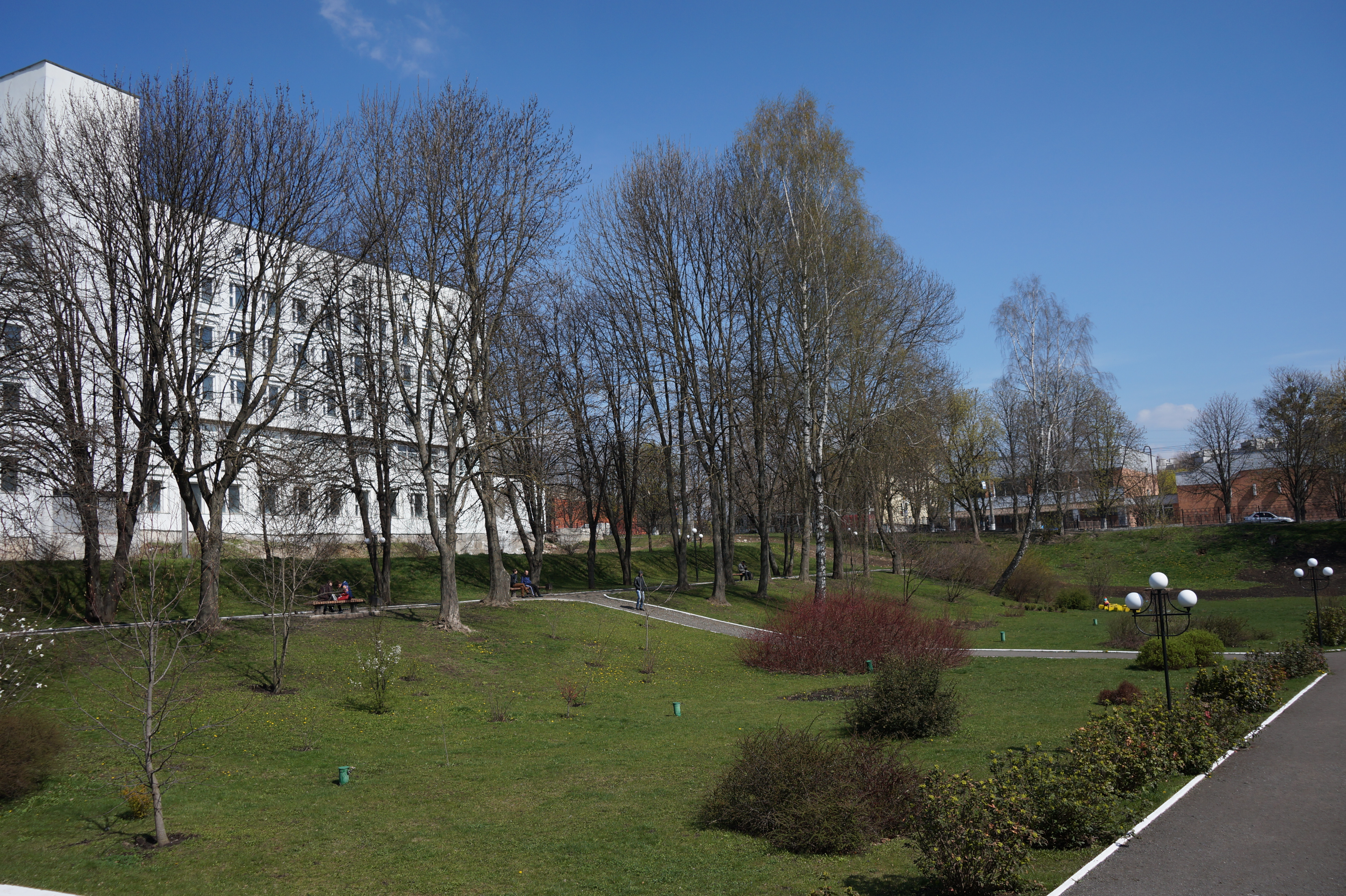 Ботанічний сад Хмельницького національного університету, м. Хмельницький, вул. Інститутська (територія Хмельницького національного університету)